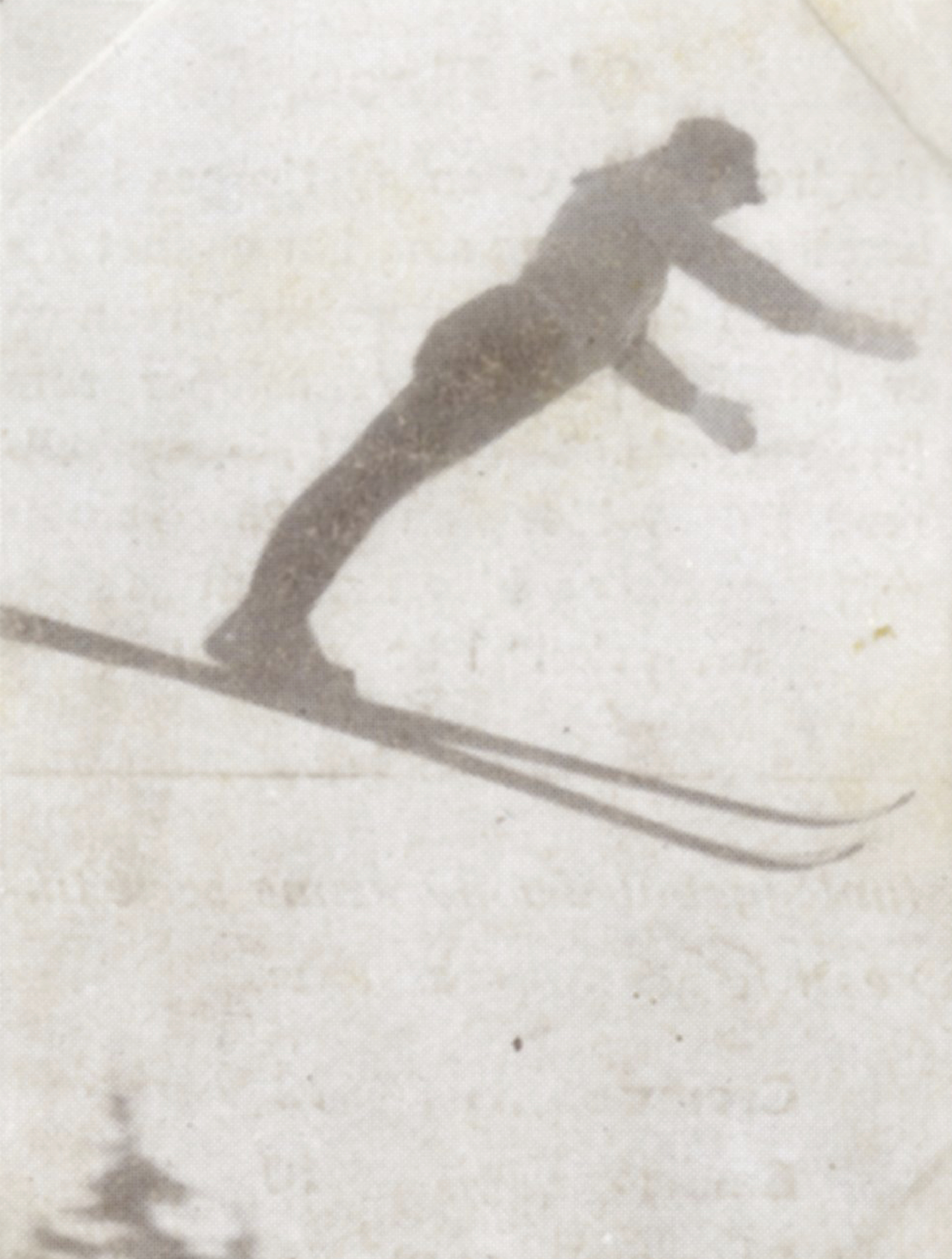 Format: Samlekort Dato / Date: ca. 1930 (dokumentet) Fotograf / Photographer: Ukjent Wikipedia: Holmenkollrennene Eier / Owner Institution: Trondheim byarkiv, The Municipal Archives of Trondheim Arkivreferanse / Archive reference: Sportsklubben Freidig: Sigarettfoto ca. 1930 (Løpenr. 75) F23959 Tekst på baksiden: Ola Moon, Nordre Land, er en av Norges beste kombinerte løpere som har vunnet A-klassen i en rekke store landsrenn og er en like god langrennsløper som fremragende stilhopper. I Holmenkollrennet 1929 blev han nr. 25 i kombinert skirenn og blev nr. 3 til "damenes pokal" i hopprennet. Merknad: Disse samlekortene med bilder av norske og internasjonale idretthelter fulgte med i sigarettpakker på 1920 og 30-tallet - derav tobakksreklamen på baksiden. Samlekortene kommer fra Sportsklubben Freidigs arkiv, og inneholder nærmere 90 unike kort pent plassert i et samlealbum. Samleren var den senere skipsmegler Finn Følling (1914 – 1985).